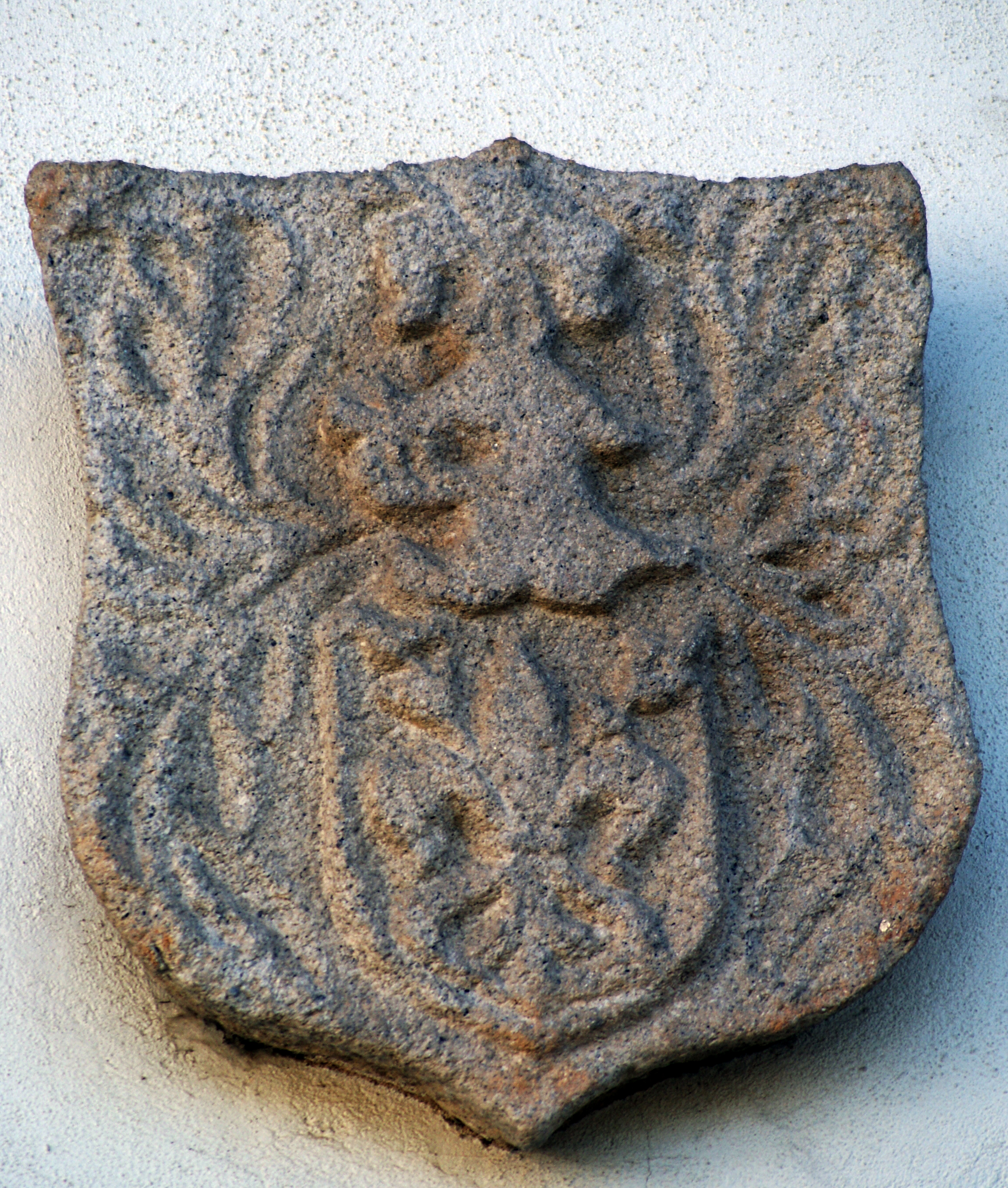 Brasão com as armas de Esteves da Veiga, com uma merleta por diferença. Corresponde à Carta de Brasão de Armas passada a Henrique da Veiga em 31 de Agosto de 1542